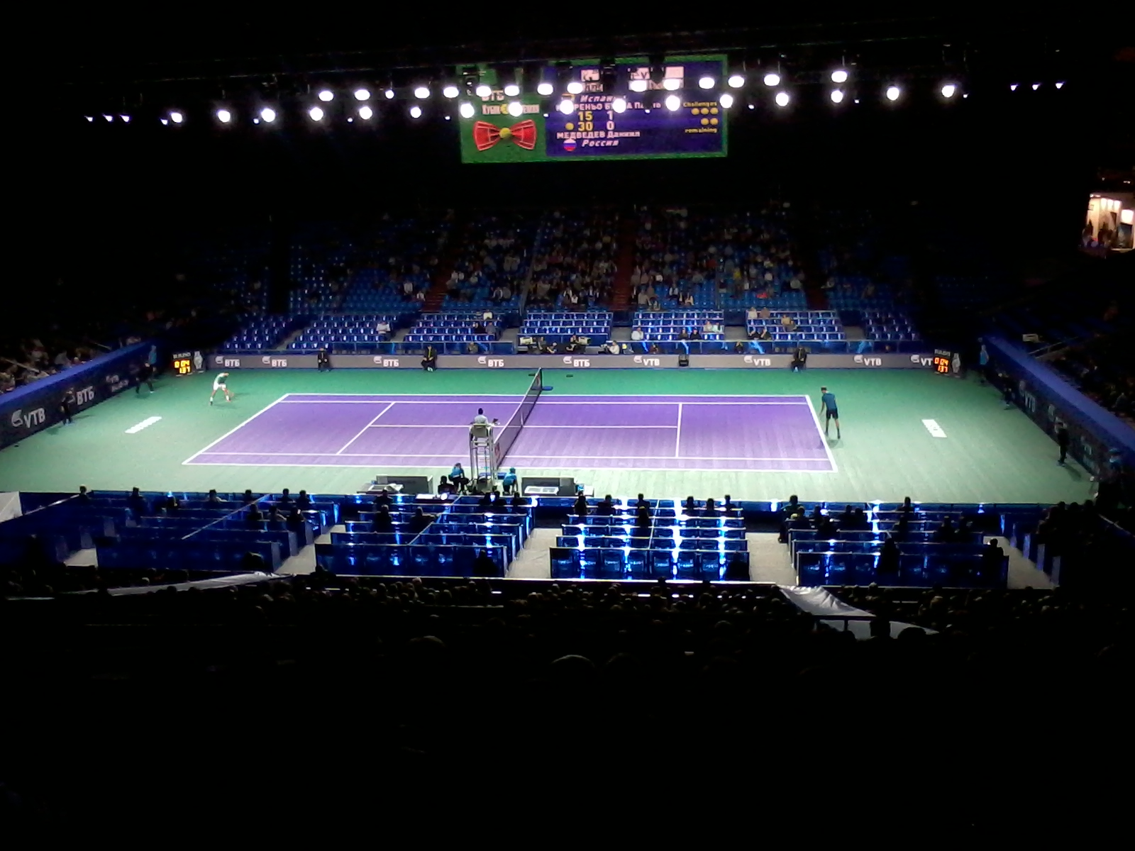 Матч второго раунда Кубка Кремля 2017 мужского одиночного разряда между Пабло Карреньо и Даниилом Медведевым